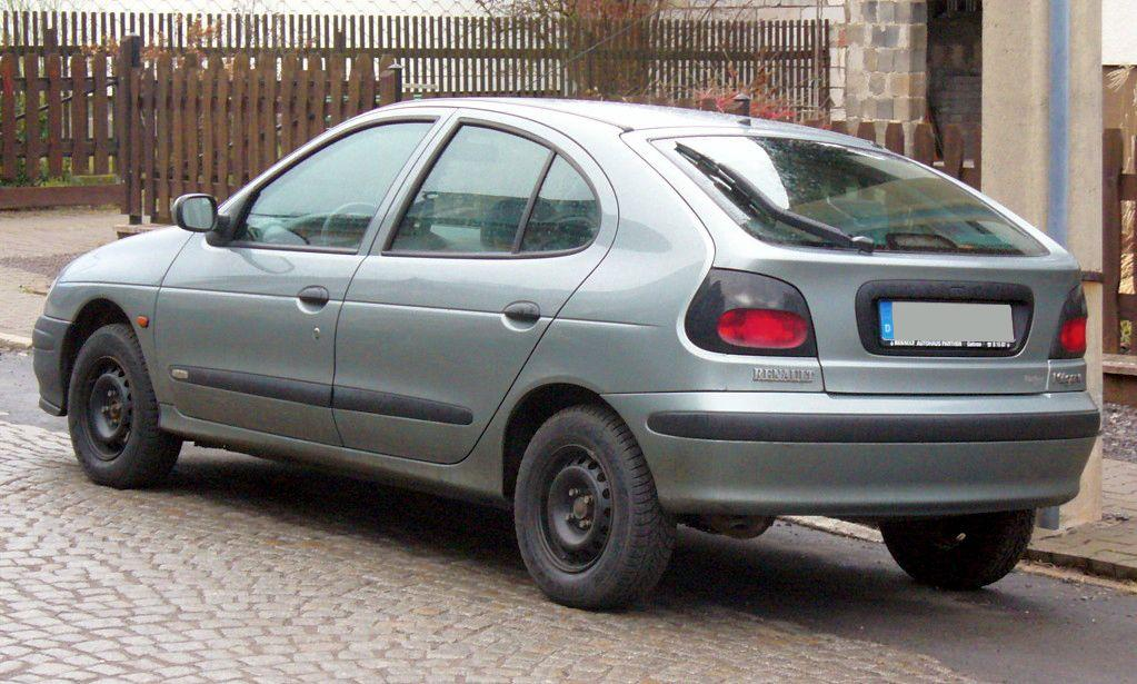 Renault Mégane I Phase I